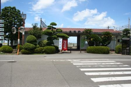 高尾野駅駅舎